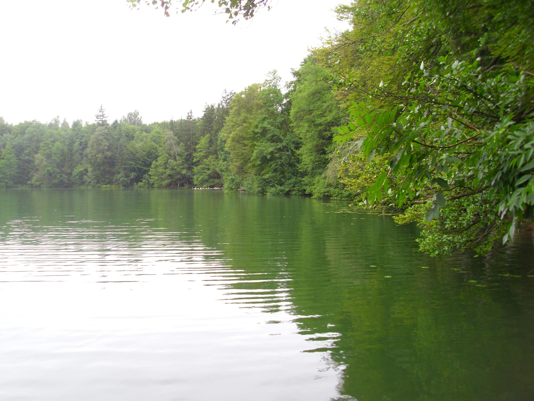 Tüttensee, bewaldetes Ufer